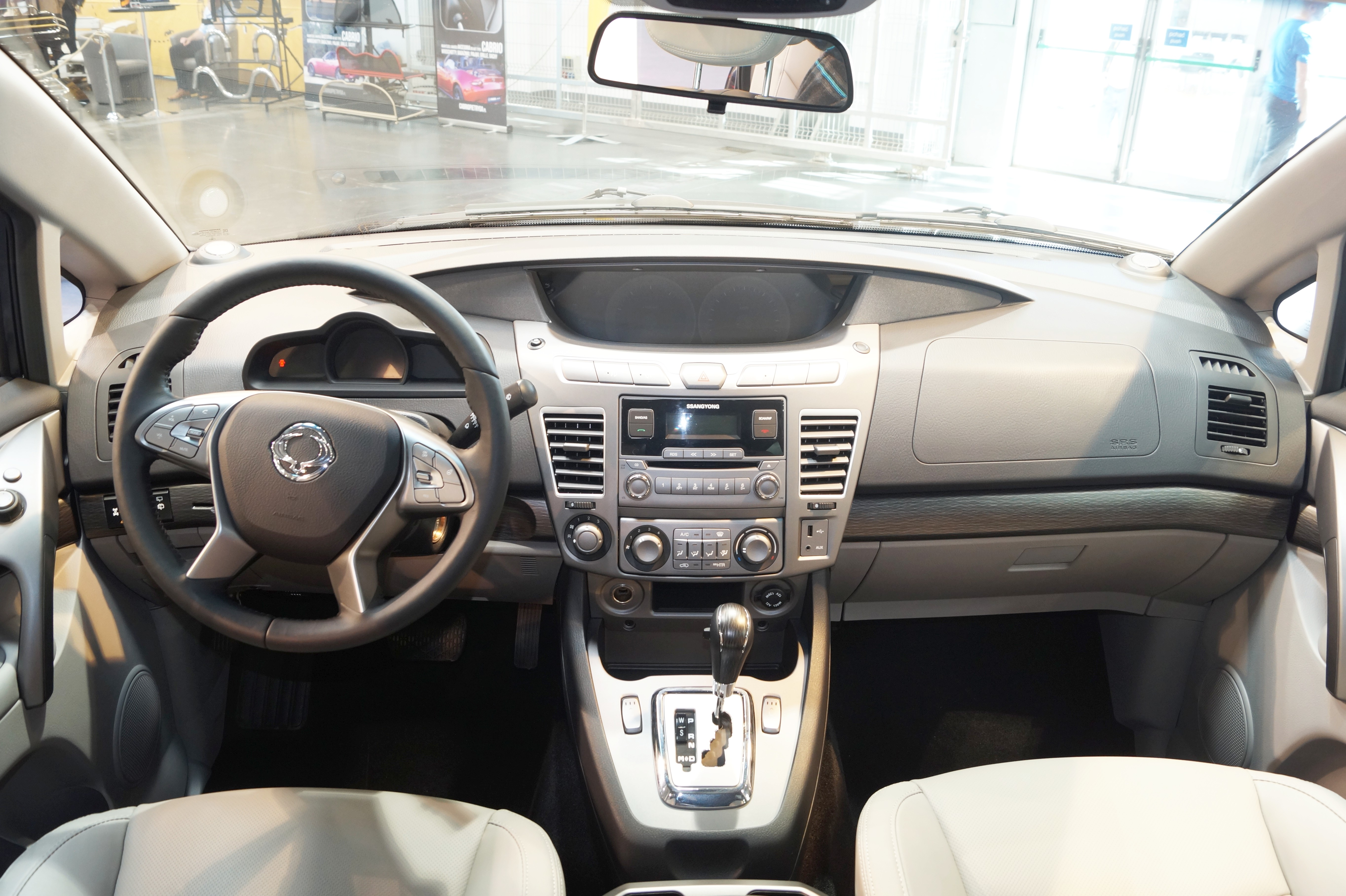 Wnętrze SsangYonga Rodius na Motor Show Poznań 2017.